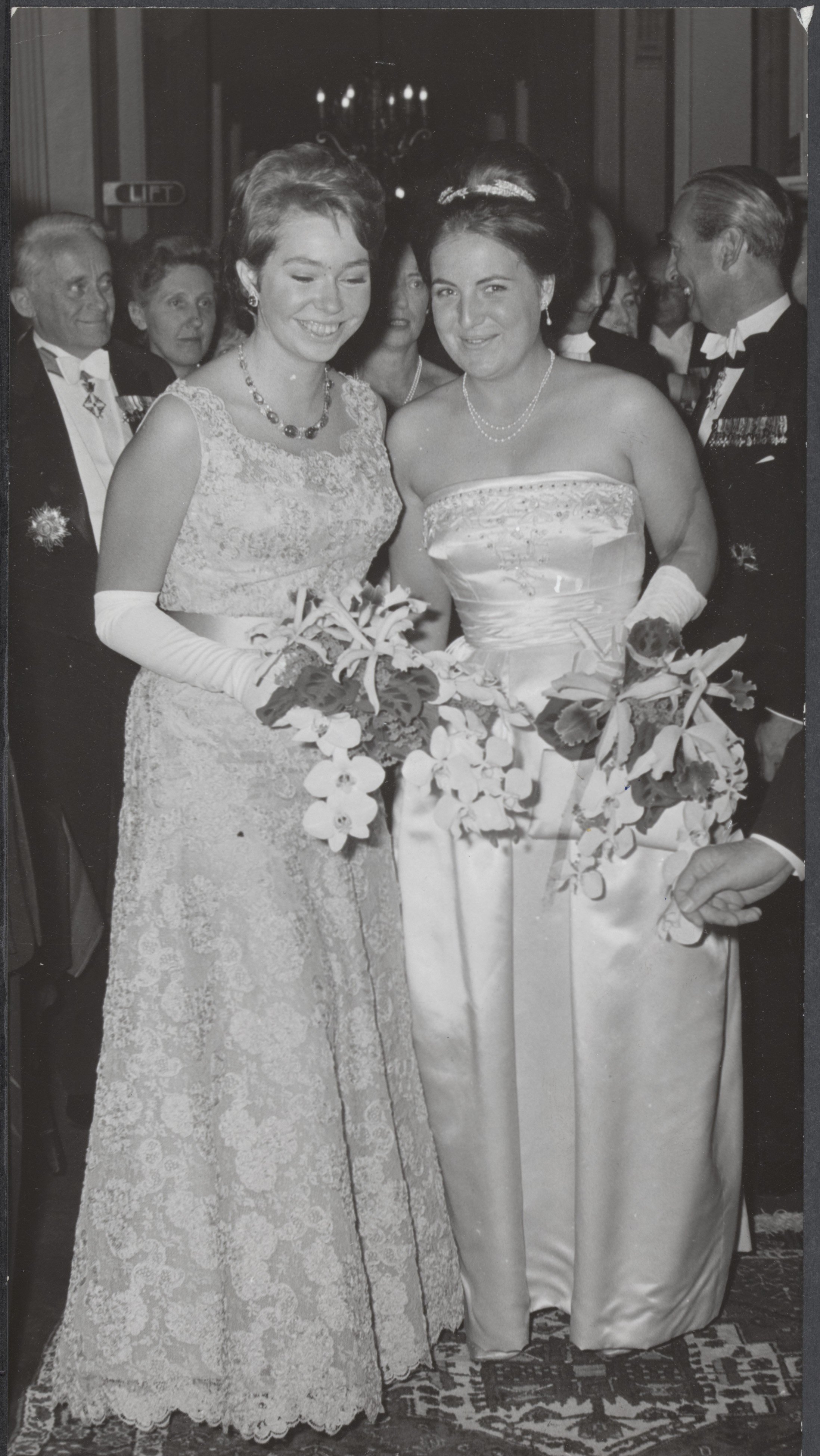 Holland Festival in Kurhaus te Scheveningen geopend, Prinses Christina van Zweden en Prinses Margriet bij het betreden van de concertzaal. Datum 15 juni 1964